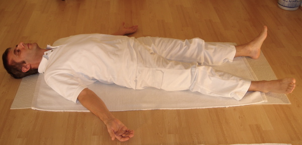 Yoga postures Shavasana